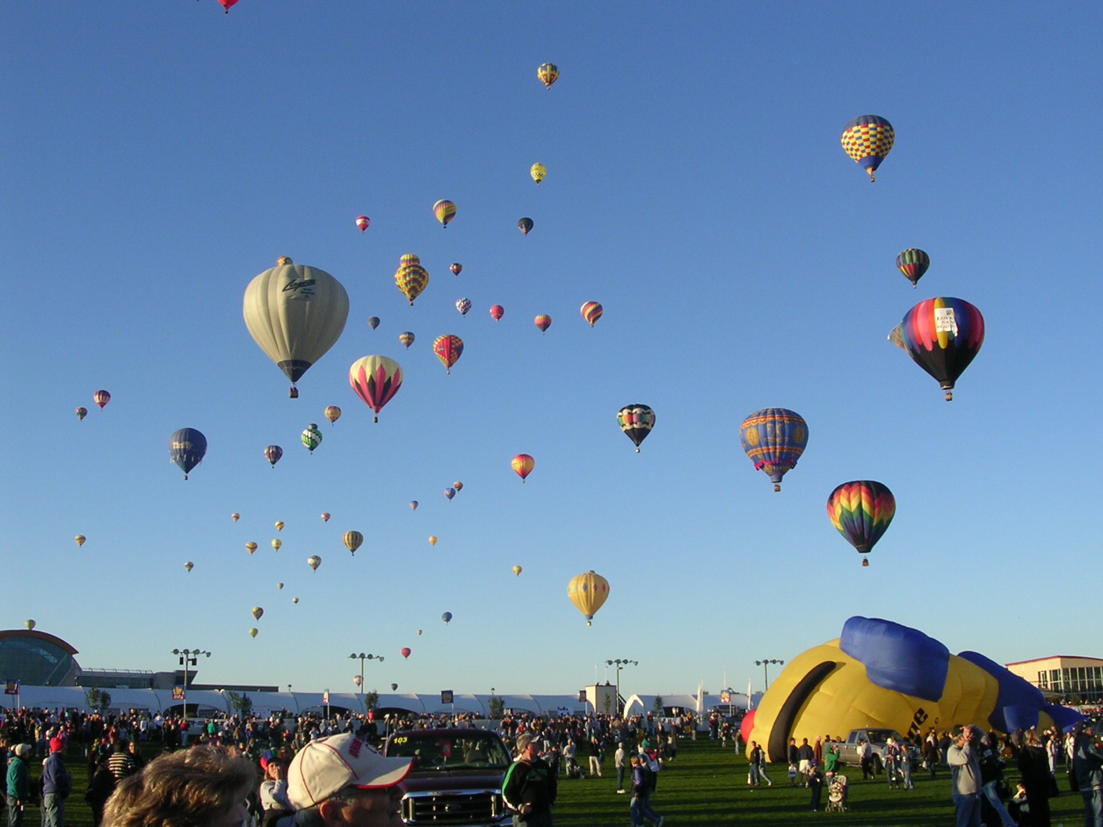 no original description